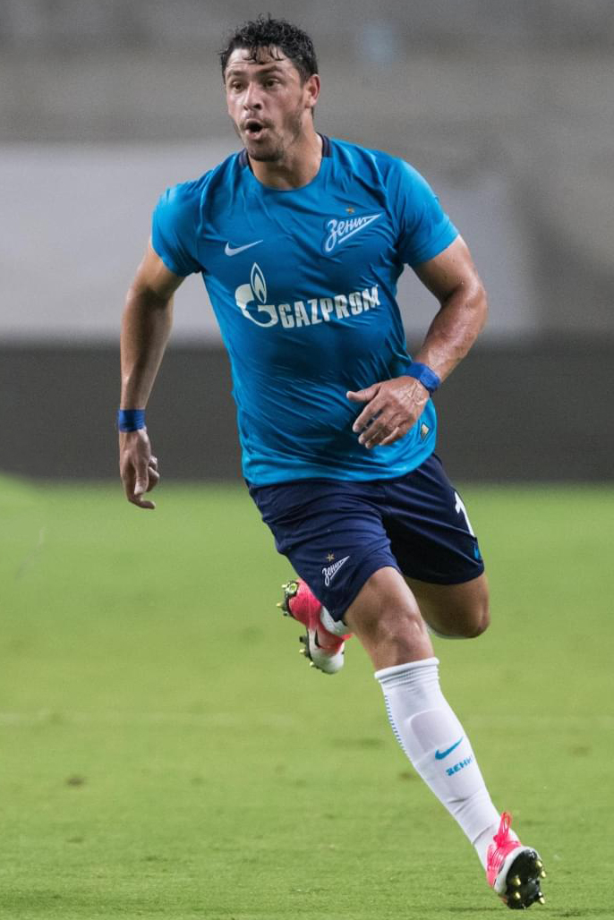 27.07.17. Израиль, Петах-Тиква, стадион «Ха-Мошава». Матч Лиги Европы УЕФА 2017/18, «Бней-Иегуда» — «Зенит». На снимке в синей форме: Жулиано, полузащитник ФК «Зенит».